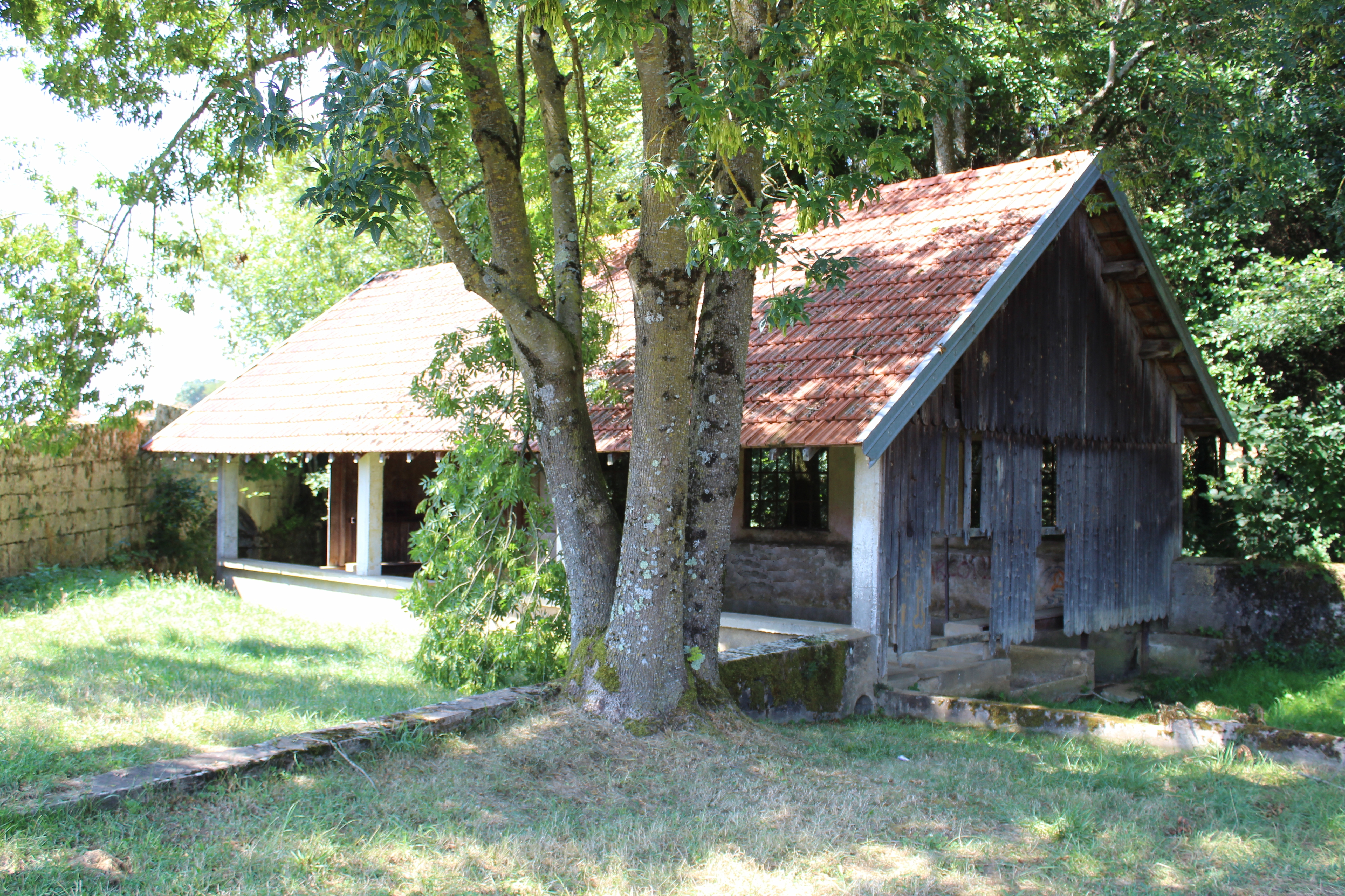 Le lavoir